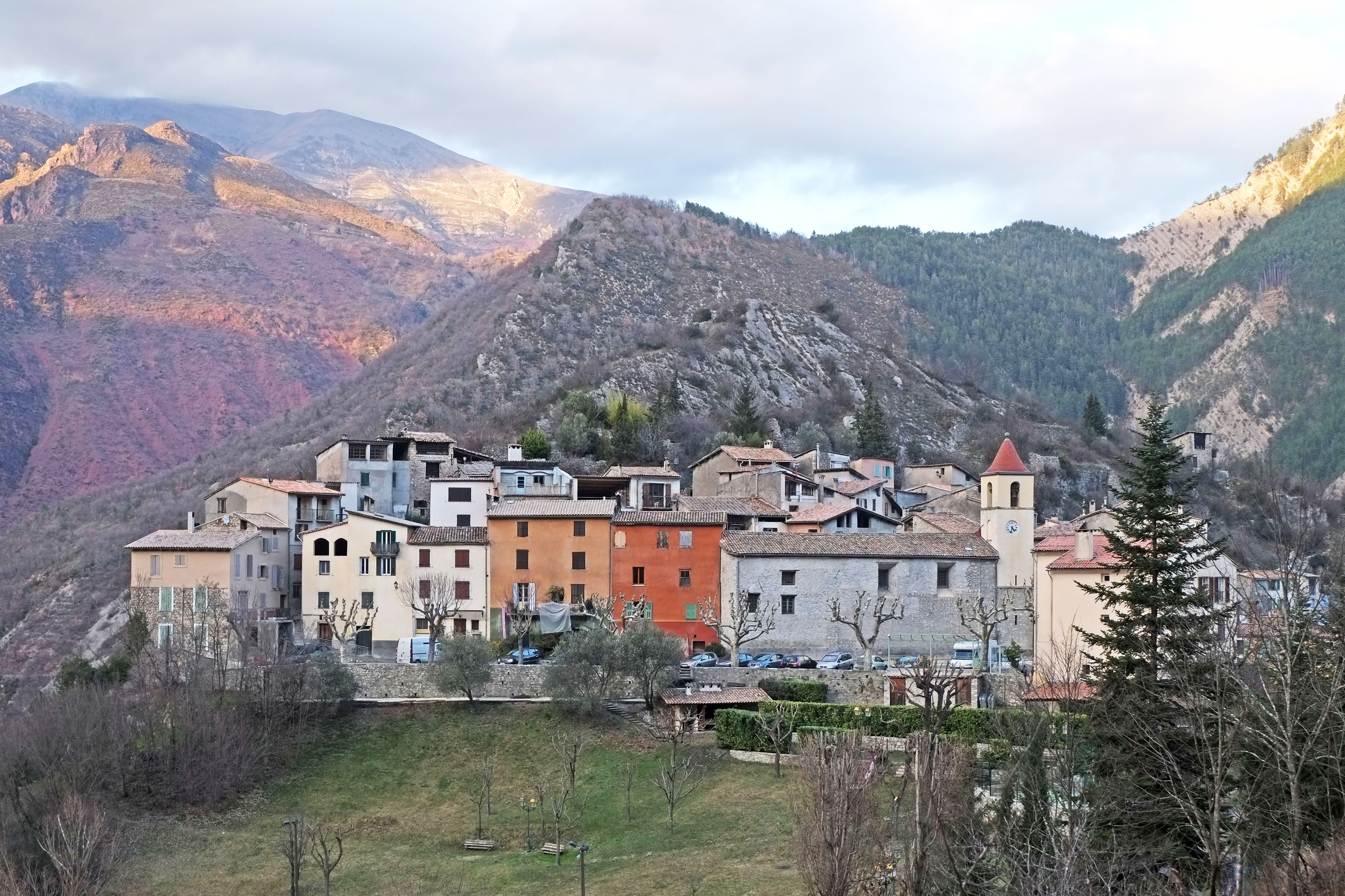 Vue du village de Rigaud en descendant du plateau de Dina